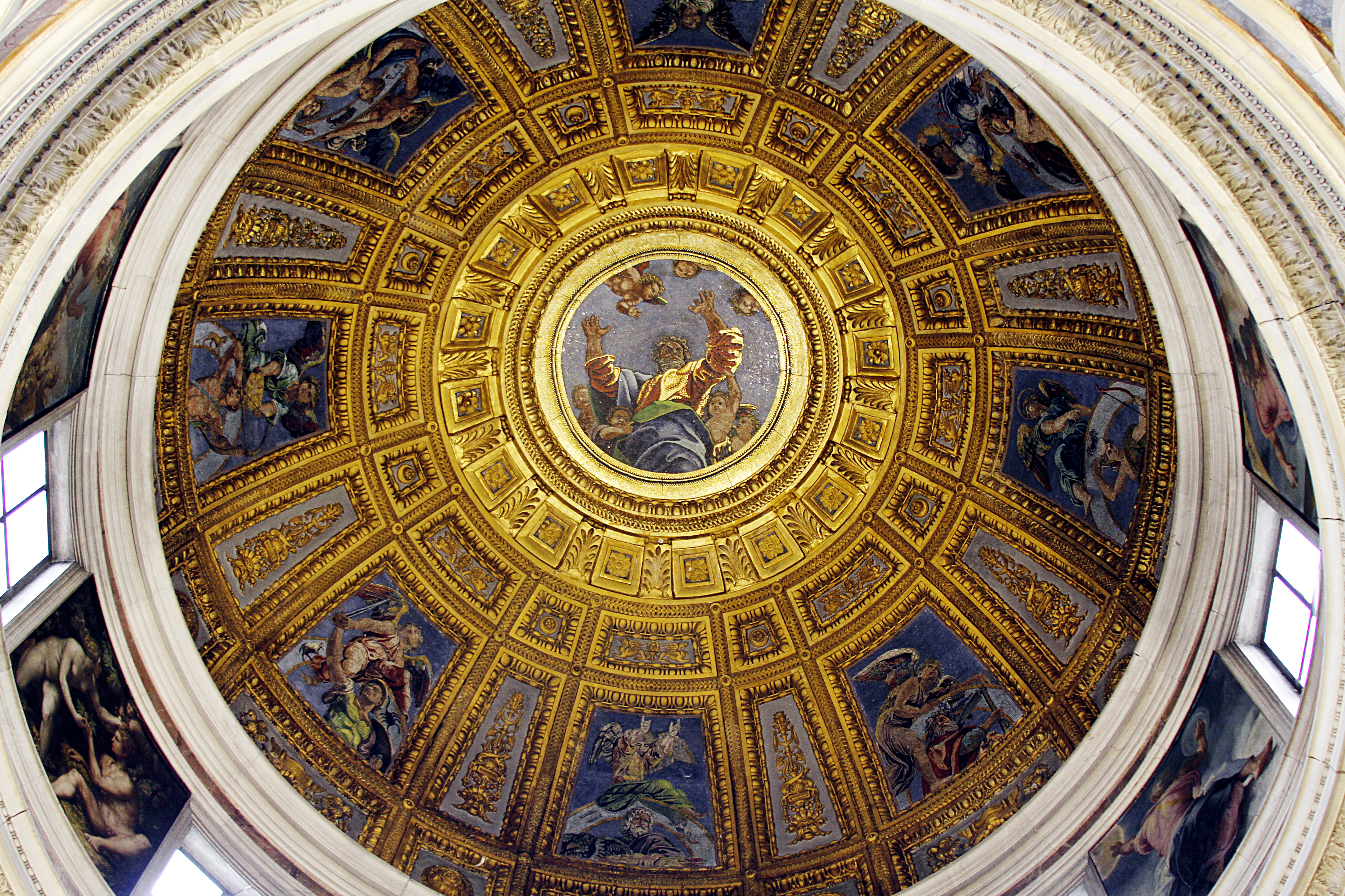 Santa Maria del Popolo - Rome